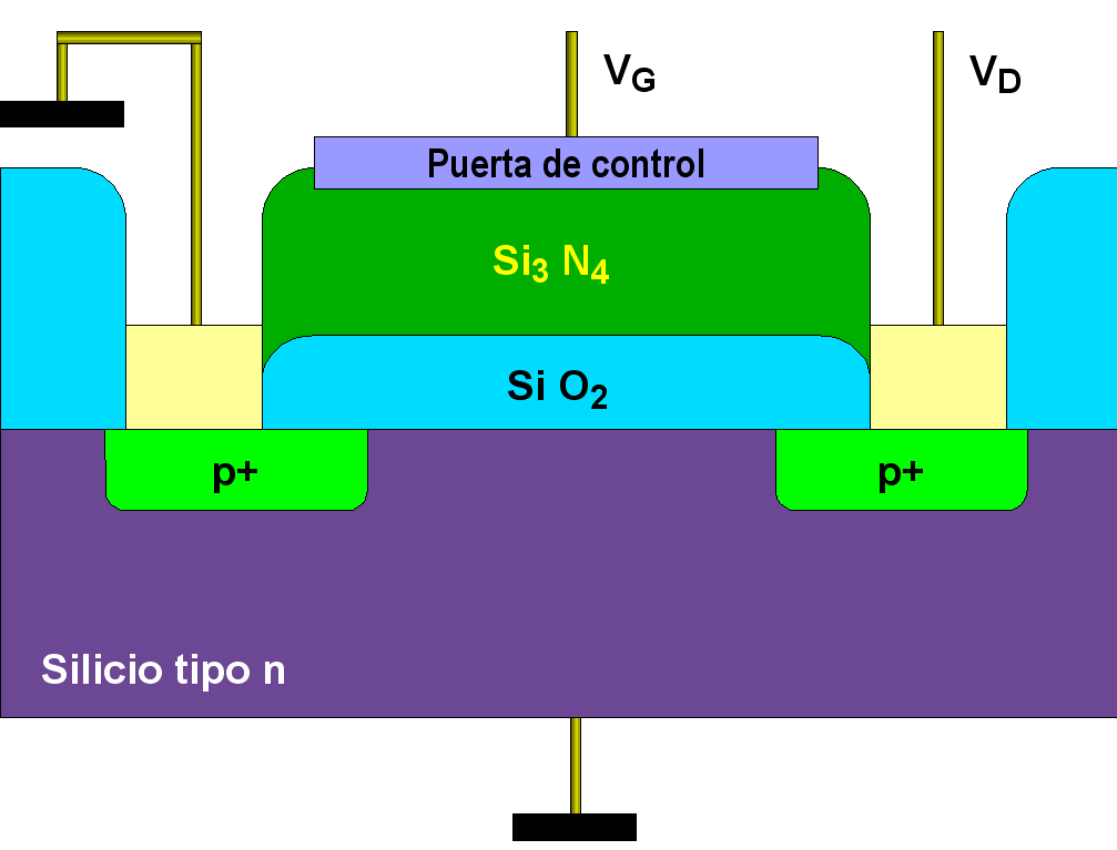 Estructura MIOS